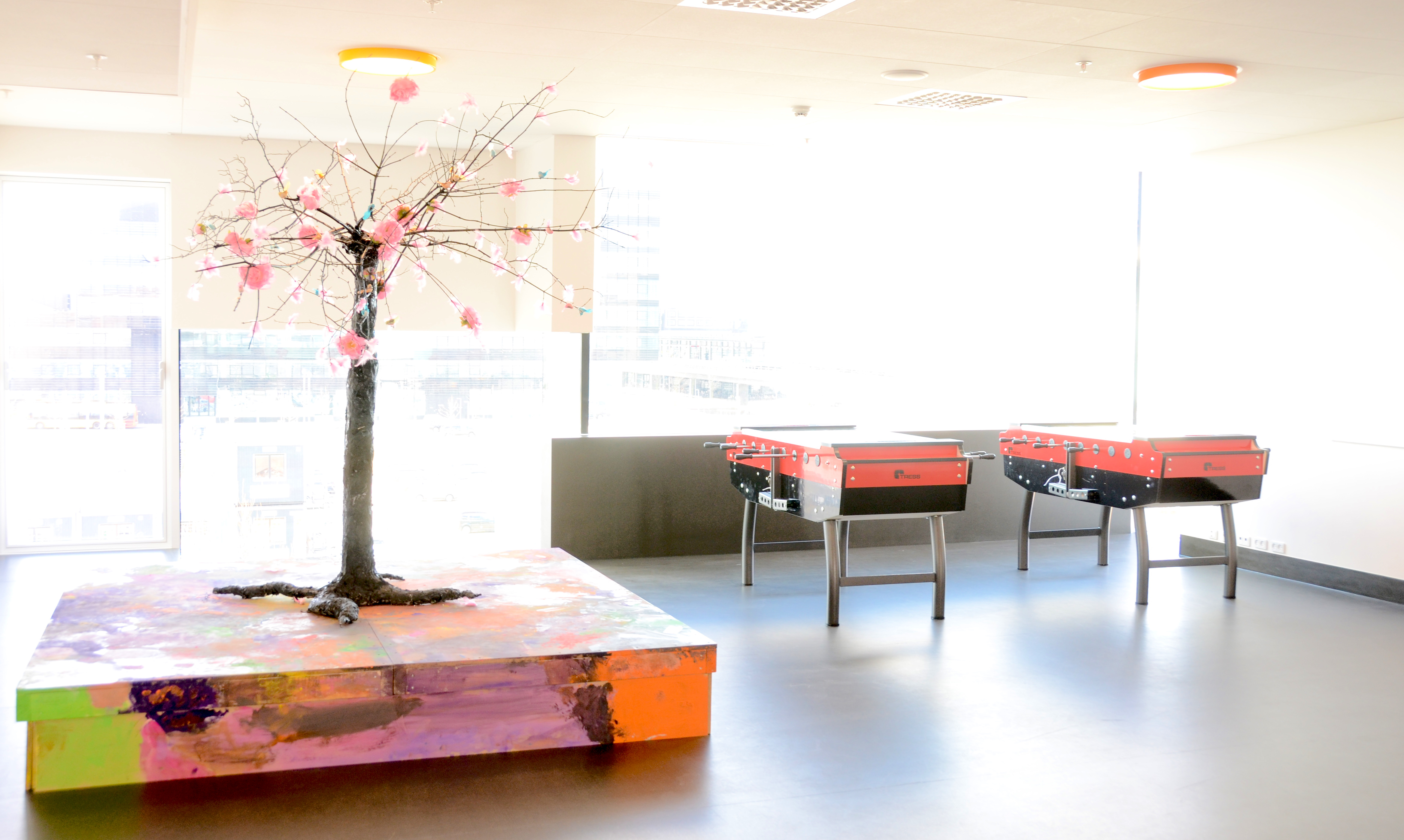 Ørestad Skole ved indvielse 16. april 2012.